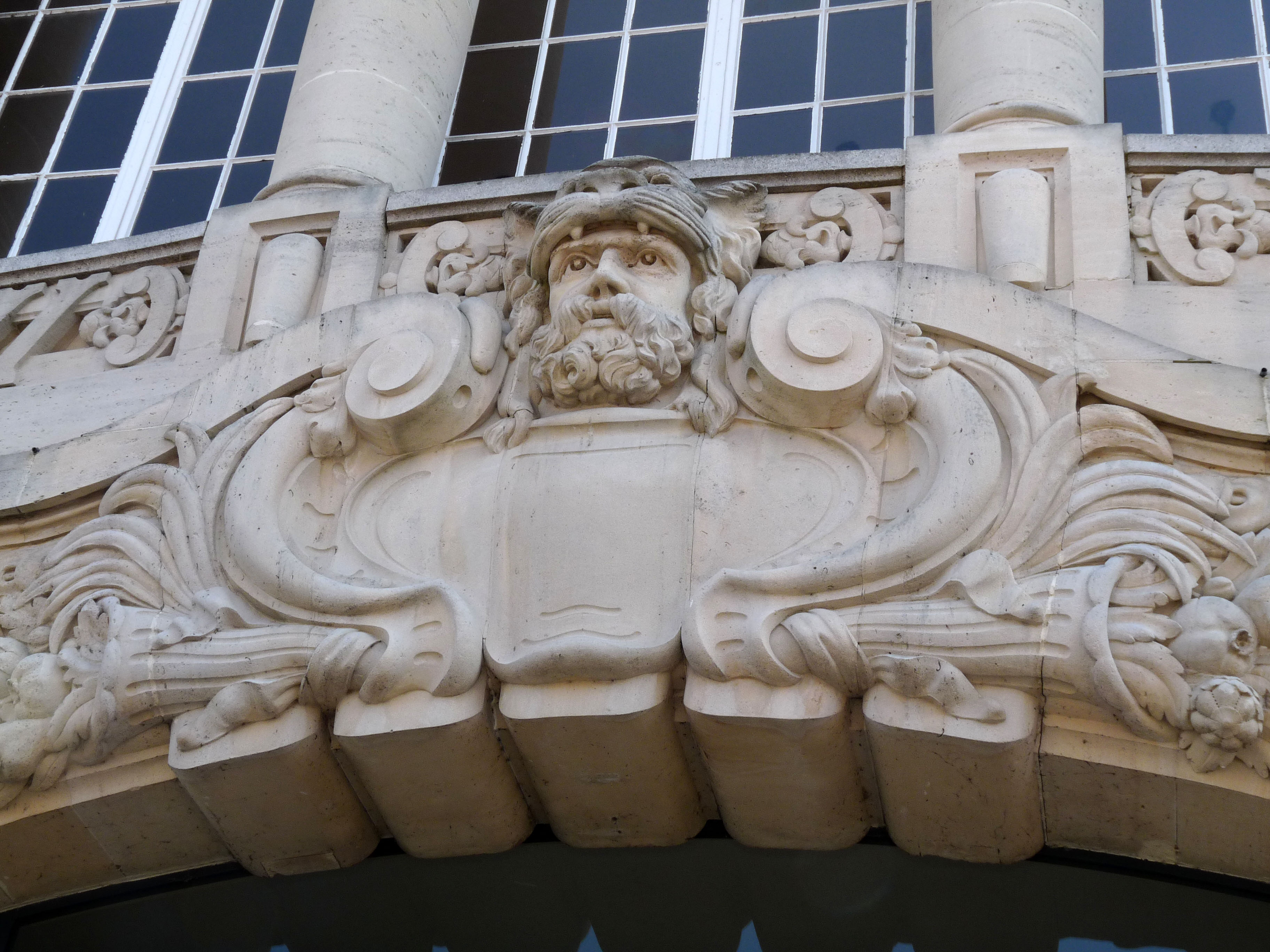 La Caisse d'épargne de Wassy (Haute-Marne), 31 rue du Général Leclerc, construite en 1904. Détail de la façade (Hercule)